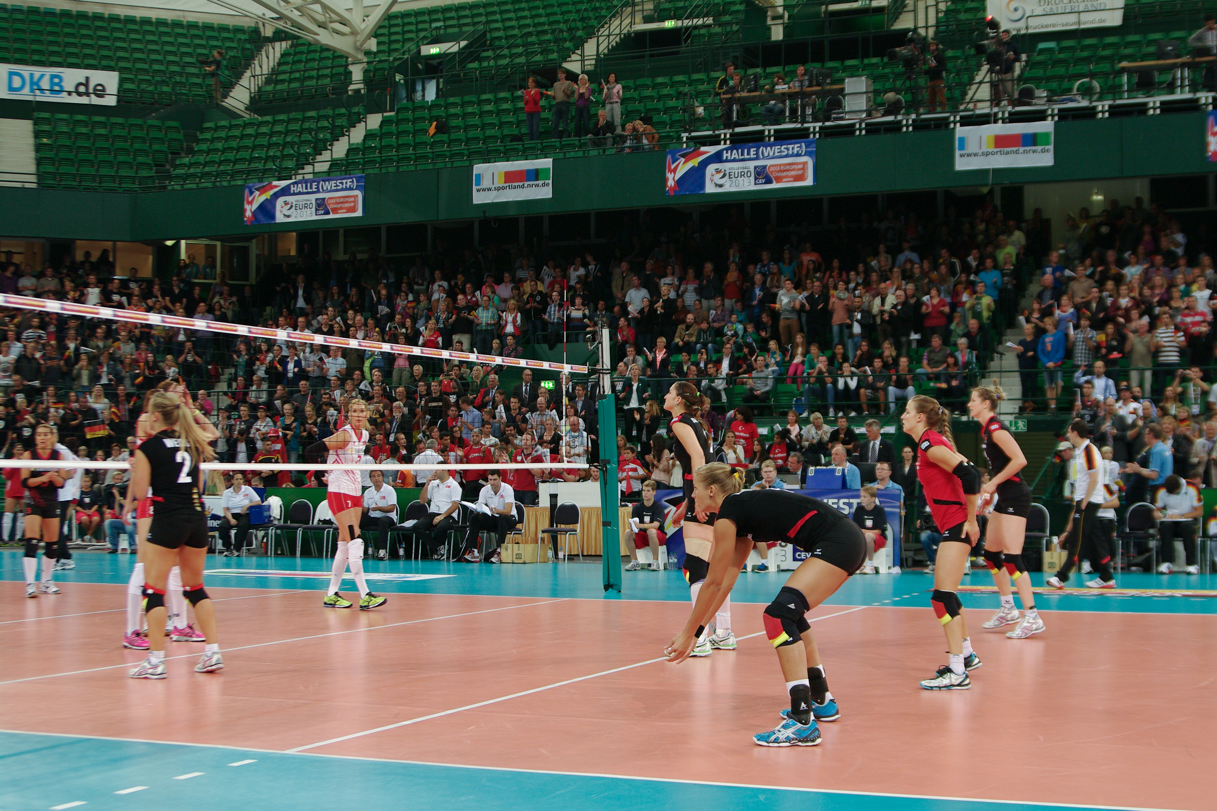 Volleyball-Europameisterschaft der Frauen 2013-Spielort Halle (Westf) Gerry-Weber-Stadion